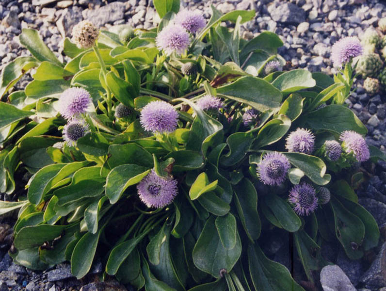 Globularia punctata